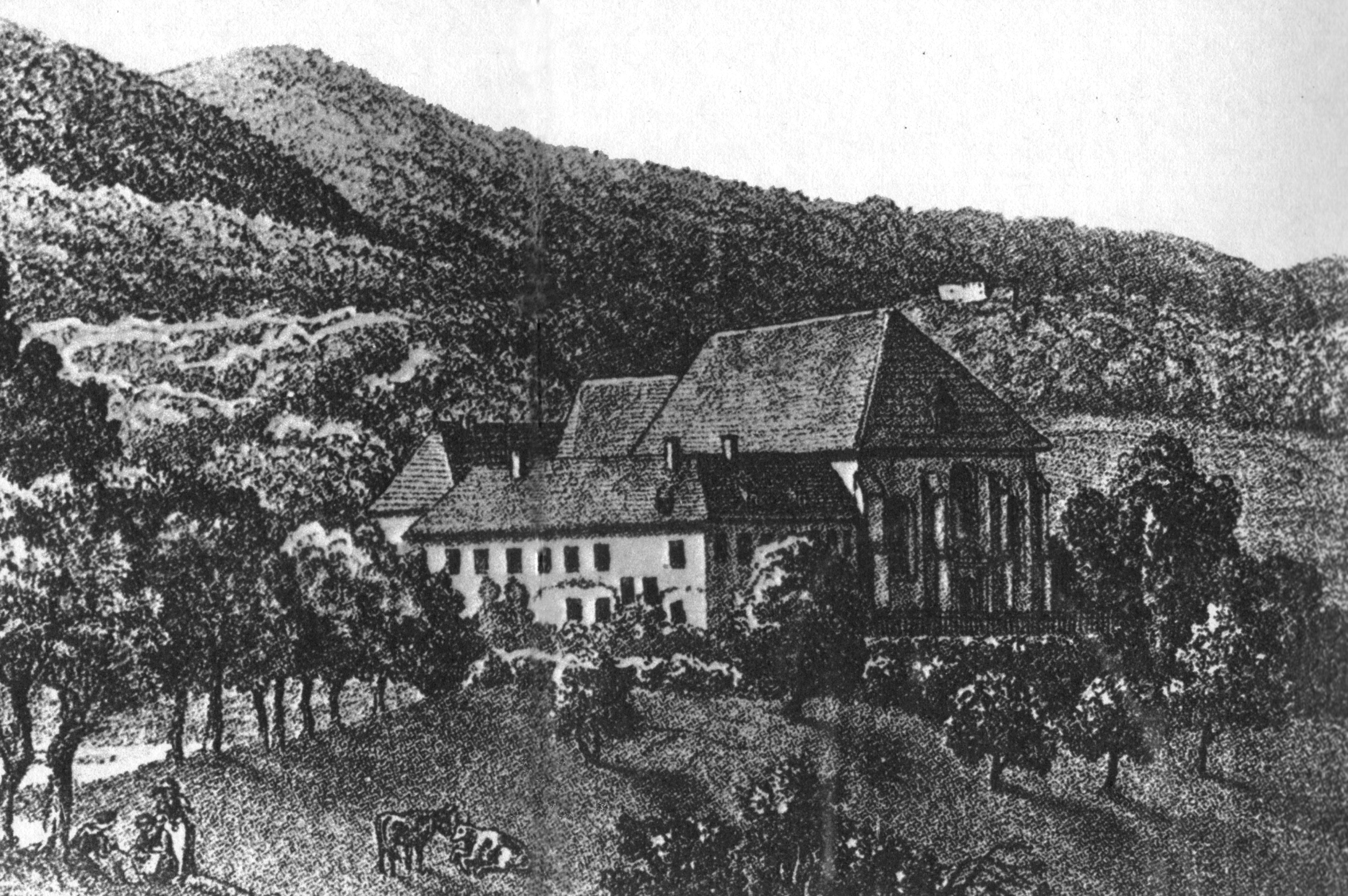 Thierenbach : Photographie en noir et blanc du Prieuré, prise avant l'incendie de 1884